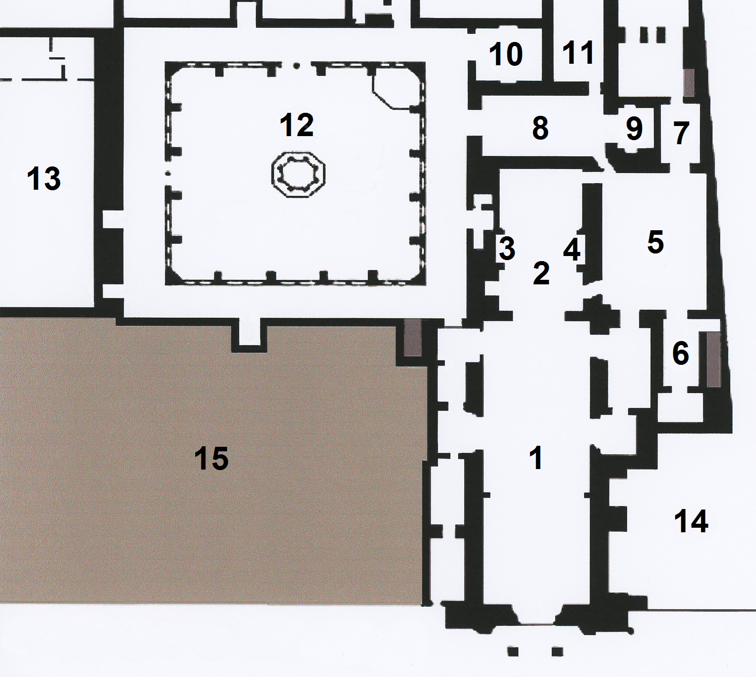 Planta esquemática do Mosteiro de Santa Cruz, Coimbra 1 Nave da igreja; 2 Capela-mor; 3 Túmulo de D. Afonso Henriques; 4 Túmulo de D. Sancho I; 5 Sacristia; 6 Capela do tesouro; 7 Lavabo; 8 Sala do Capítulo; 9 Capela de S. Teotónio; 10 Capela de Jesus; 11 Capela de S. Miguel; 12 Claustro; 13 Antigo refeitório; 14 Café Santa Cruz; 15 Câmara Municipal de Coimbra